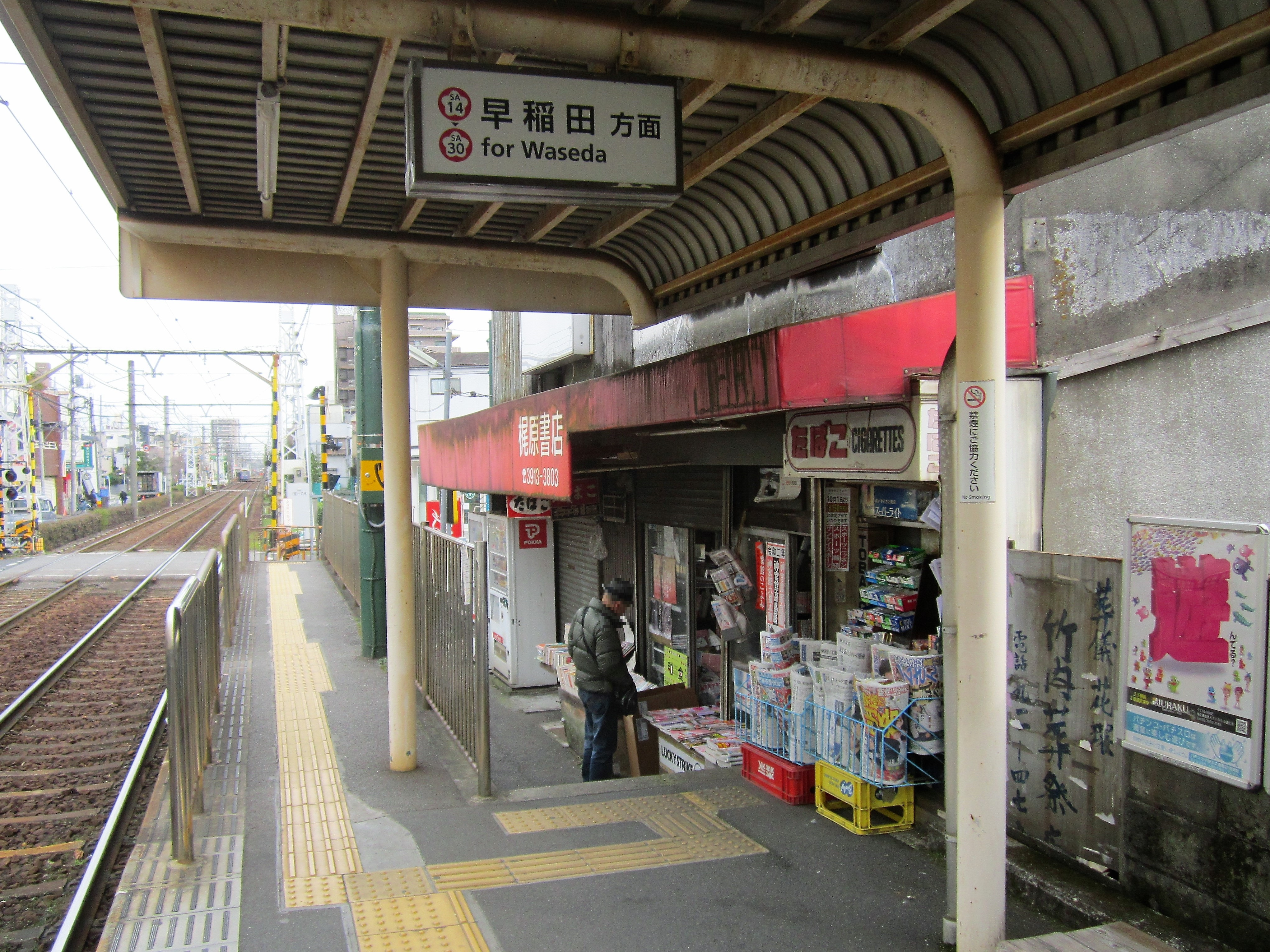 梶原停留場と古書店